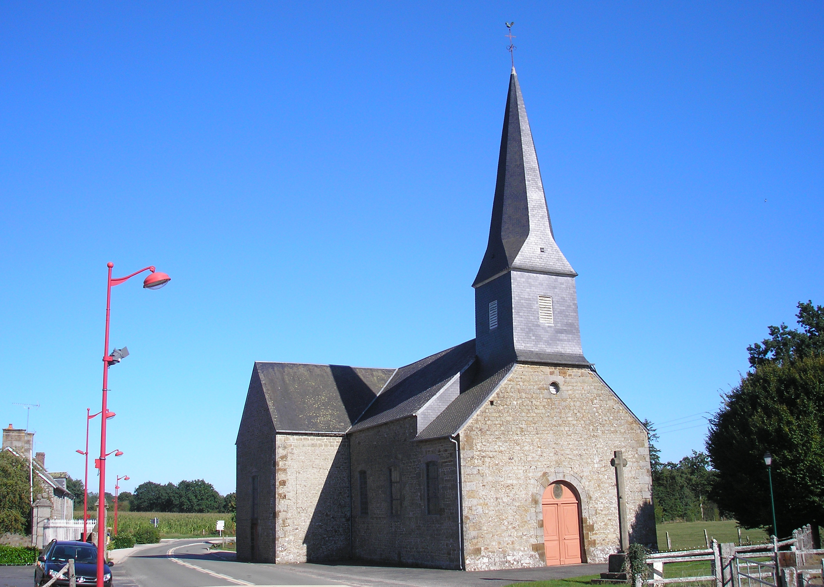 Échalou (Normandie, France). L'église Notre-Dame.